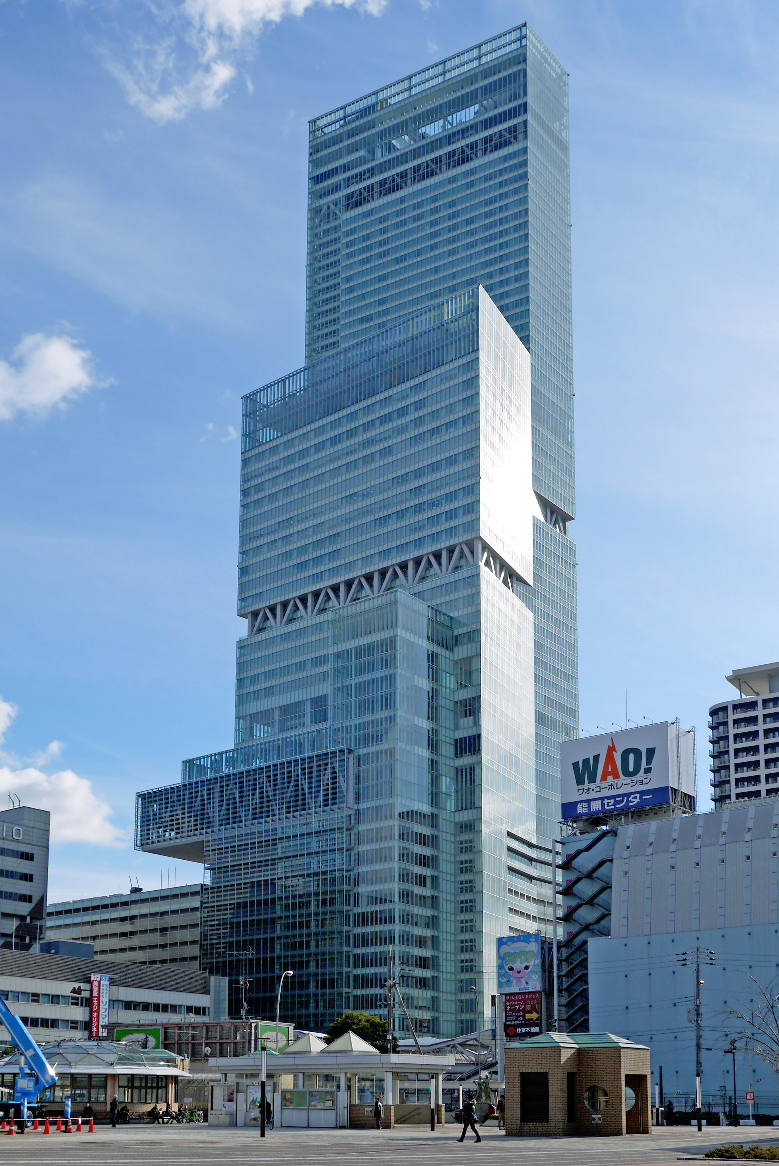 Abeno Harukas (あべのハルカス), Osaka, Osaka prefecture, Japan